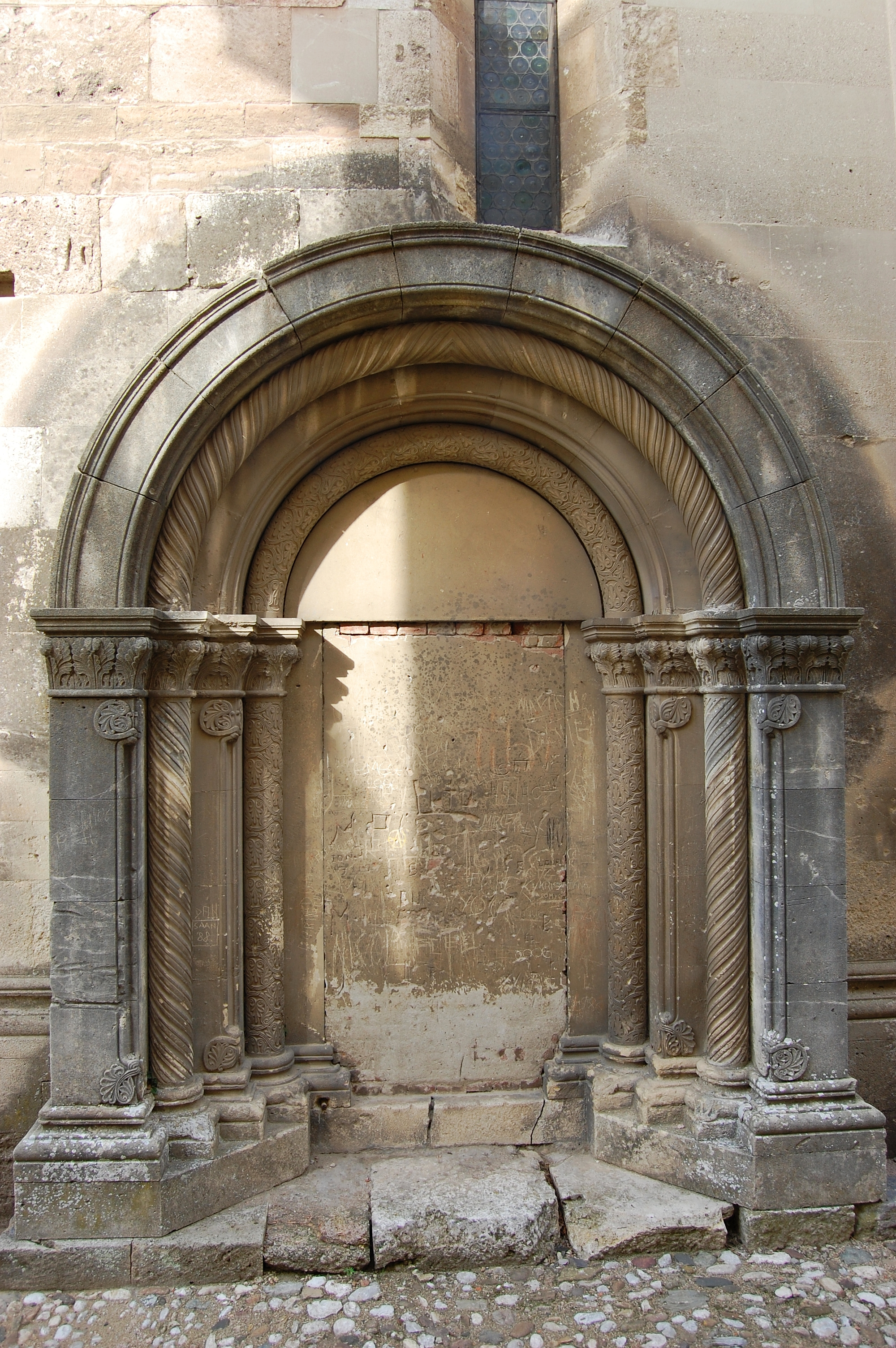 Gyulafehérvár, Szent Mihály Székesegyház - XI.-XII. sz. - a régi sekrestye bejárata